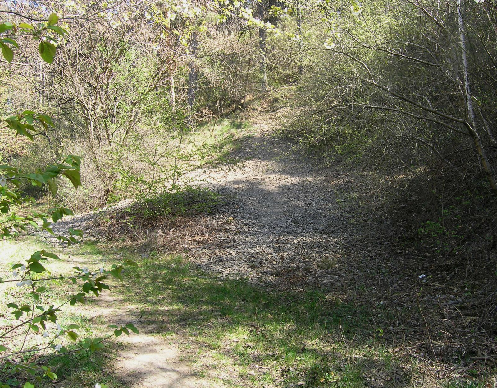 Nature reserve Ortocerový lůmek Přírodní památka Ortocerový lůmek